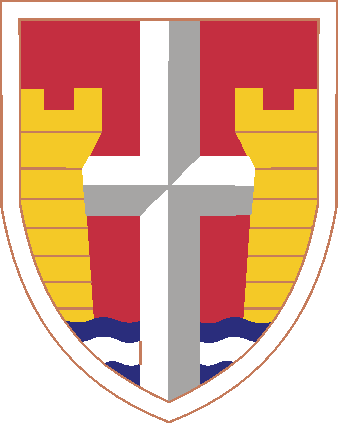 PuertoRicoSTARCSSI